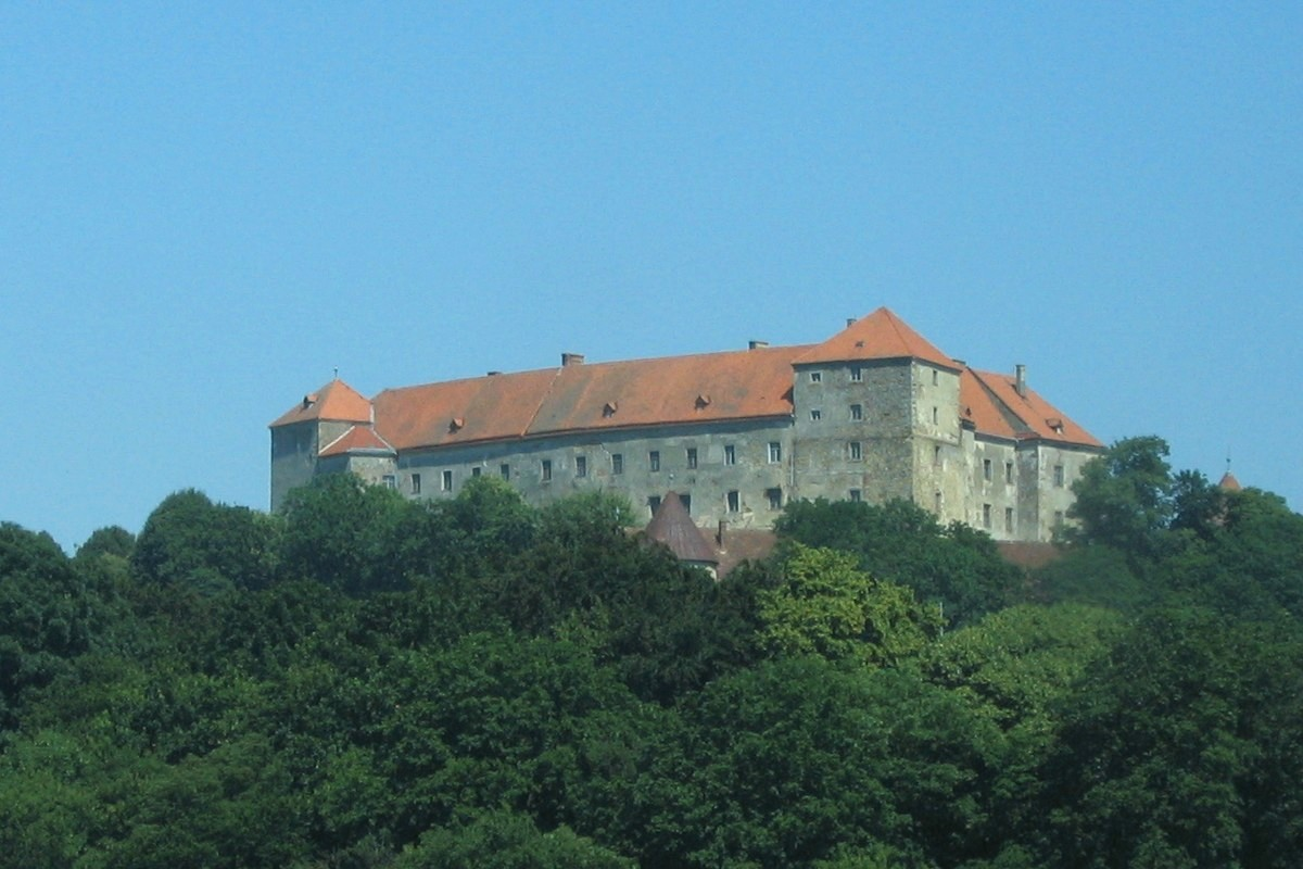 Burg Neulengbach